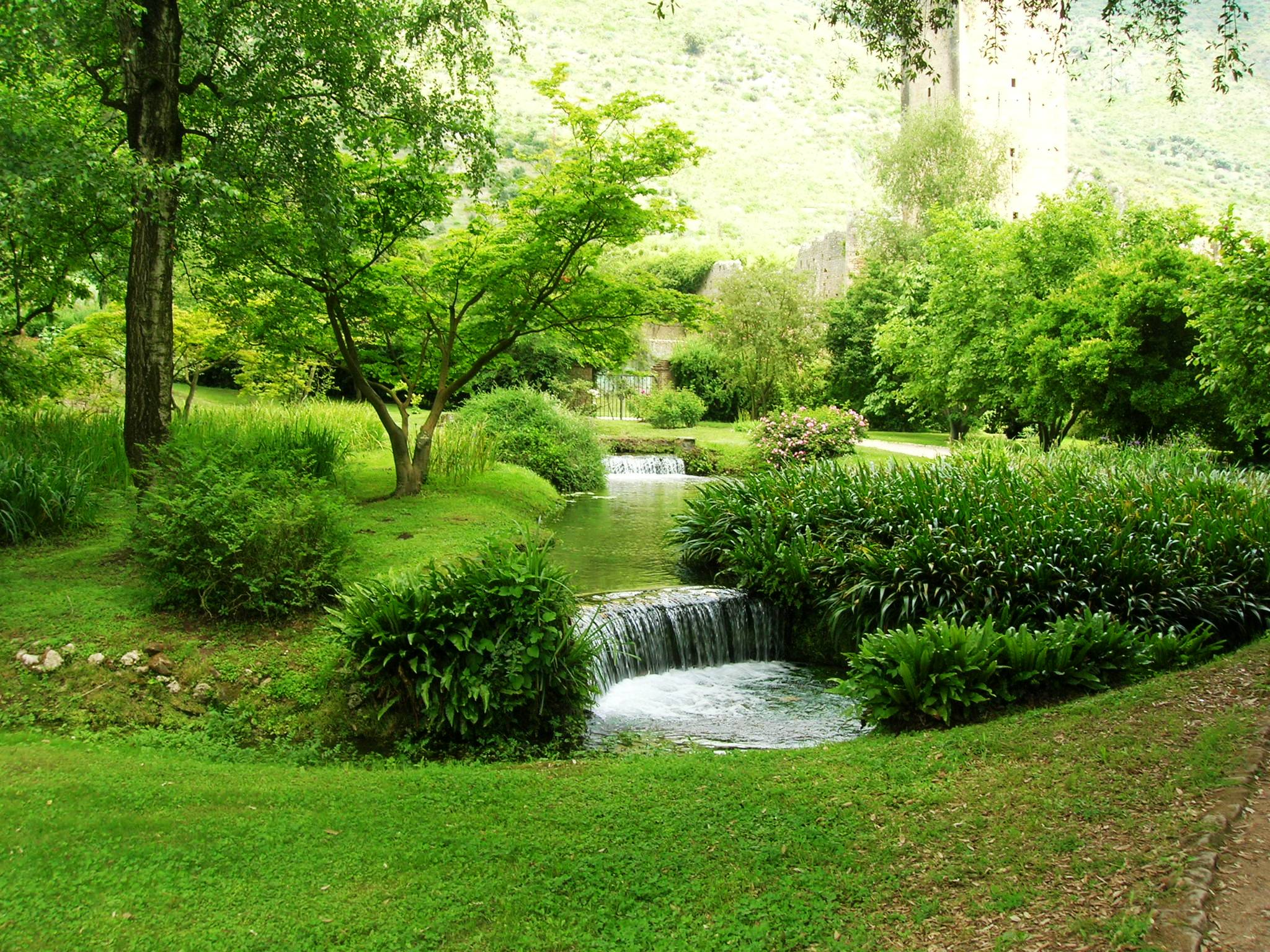 Canali d'irrigazione